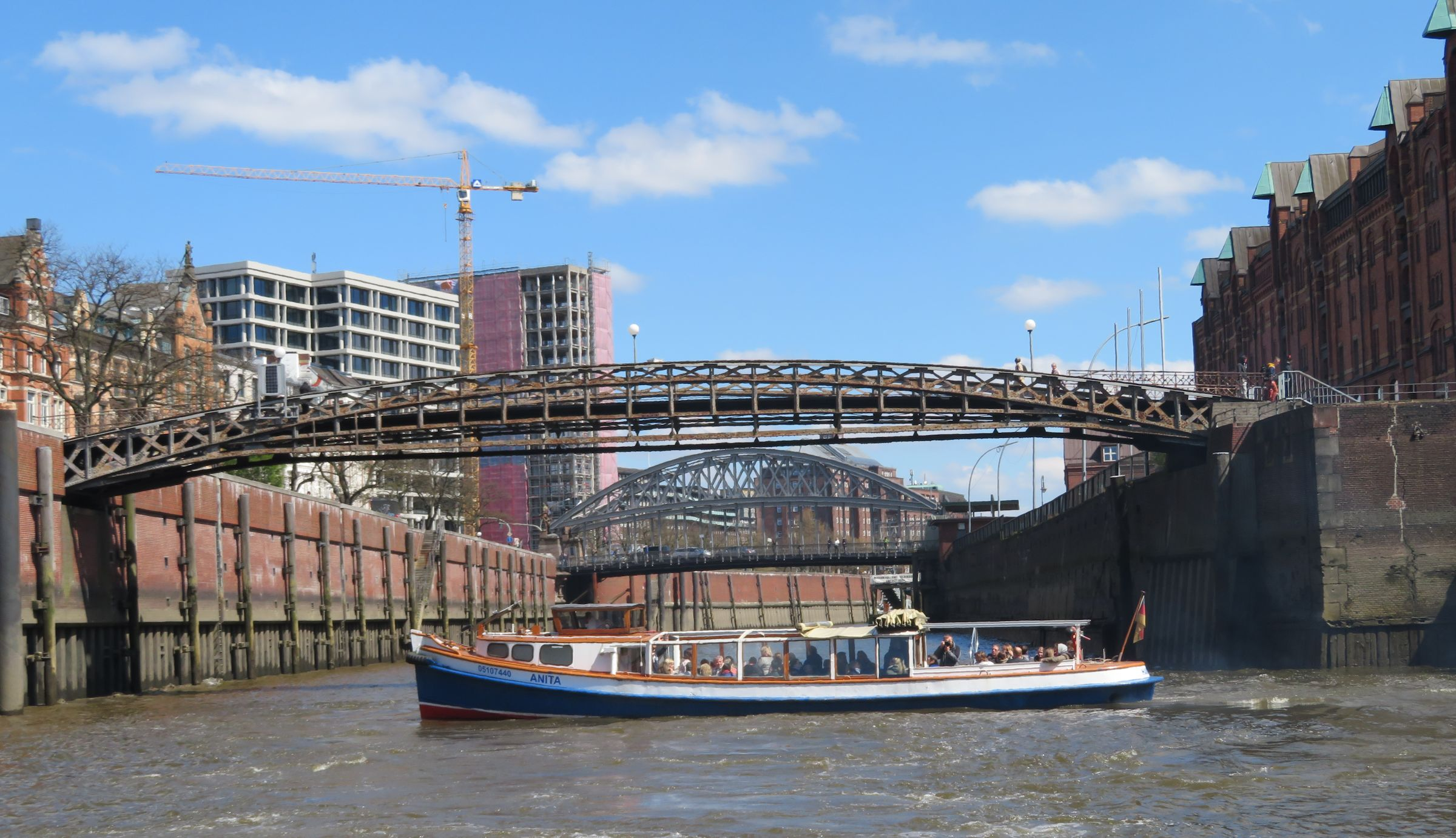 April 2017 in Hamburg